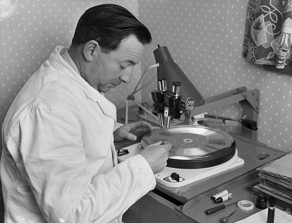 Teitl Cymraeg/Welsh title: Nodwedd ar Qualiton Records, Pontardawe Ffotograffydd/Photographer: Geoff Charles (1909-2002) Dyddiad/Date: December 3, 1959 Cyfrwng/Medium: Negydd ffilm / Film negative Cyfeiriad/Reference: (gch21183) Rhif cofnod / Record no.: 3470441 Rhagor o wybodaeth am gasgliad Geoff Charles yn Llyfrgell Genedlaethol Cymru More information about the Geoff Charles Collection at the National Library of Wales